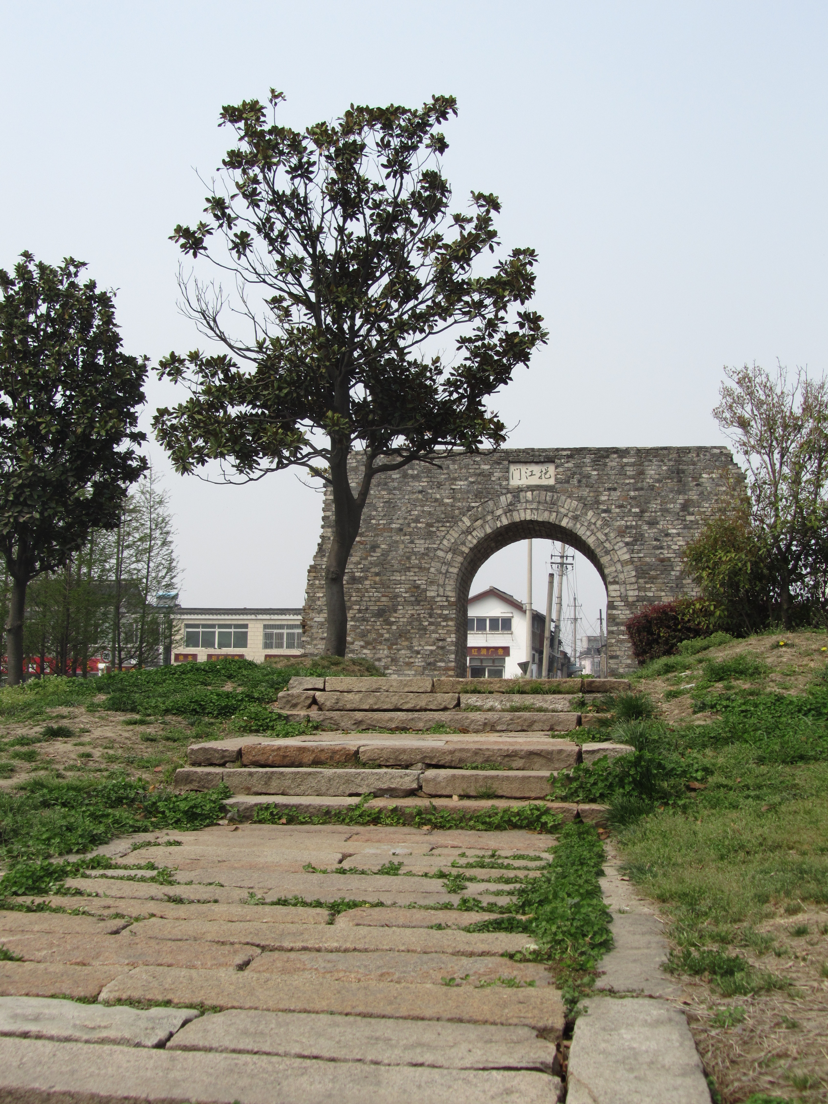 扬州挹江门，亦称钞关。